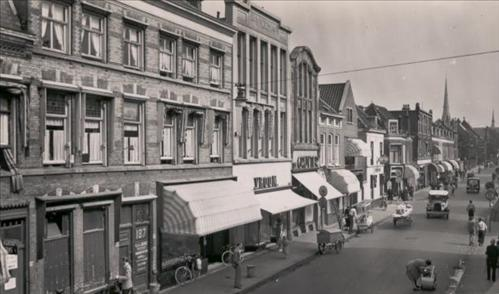 Hoefkade, Den Haag, The Netherlands in 1930